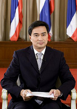 นายกตอบคำถามเวป ณ ตึกสันติไมตรีหลังใน ทำเนียบรัฐบาล 13 กุมภาพันธ์ 2553 (The Official Site of The Prime Minister of Thailand Photo by พีรพัฒน์ วิมลรังครัตน์)